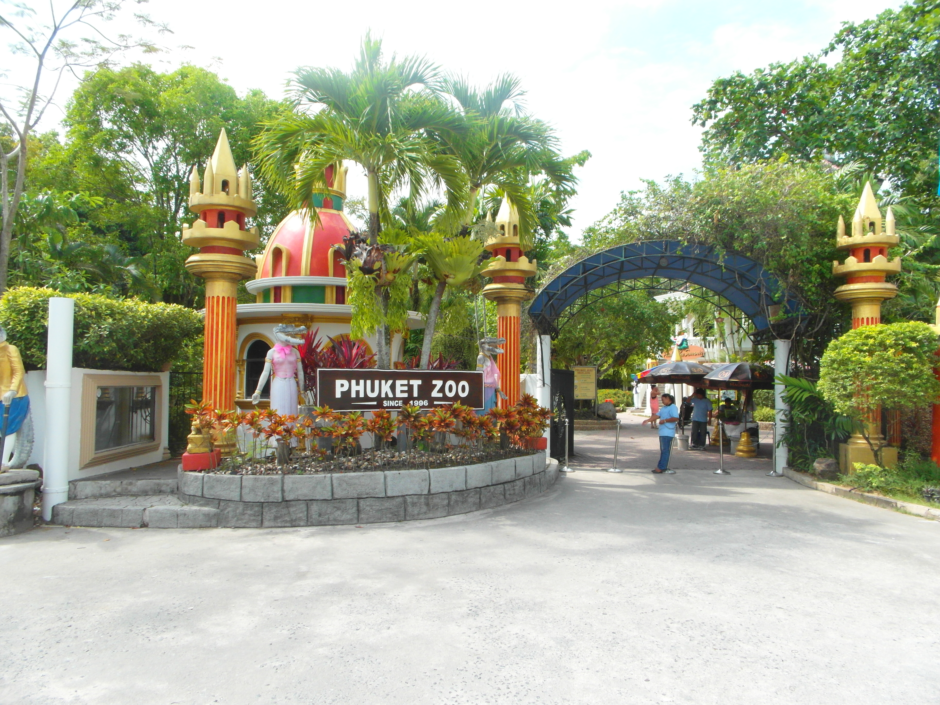 Phuket Zoo (2013 Dec.)